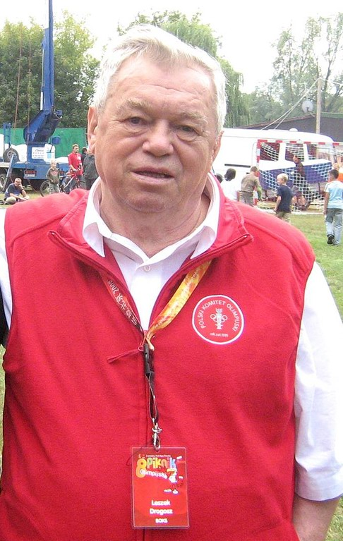 Leszek Melchior Drogosz (ur. 6 stycznia 1933 w Kielcach) - polski bokser i aktor niezawodowy.